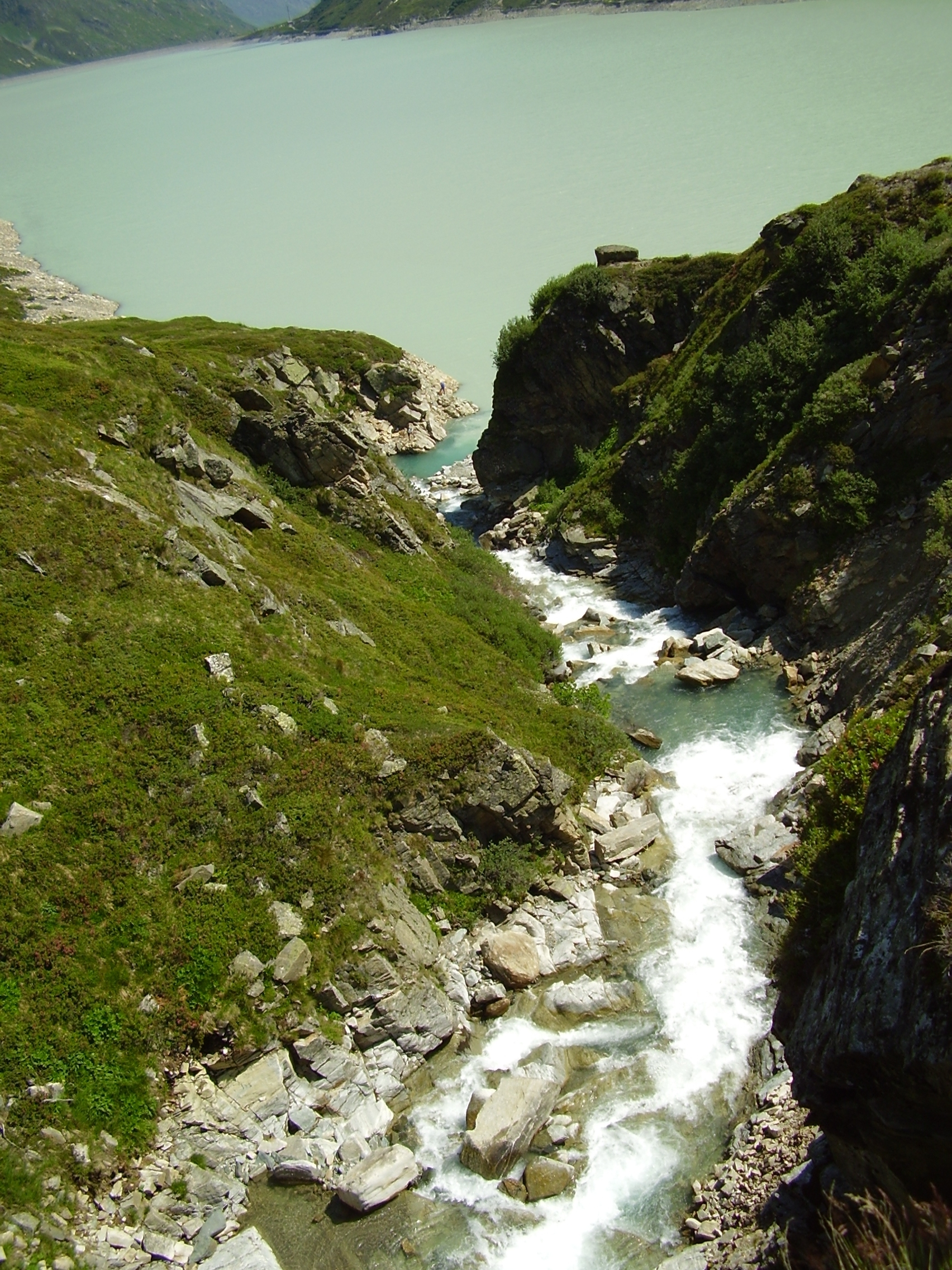 Mündung des Klostertaler Bachs in den Silvretta-Stausee.